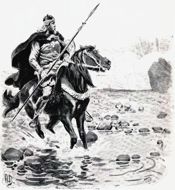 Illustrasjon til «Fortællingen om Ravnkel Freysgode».